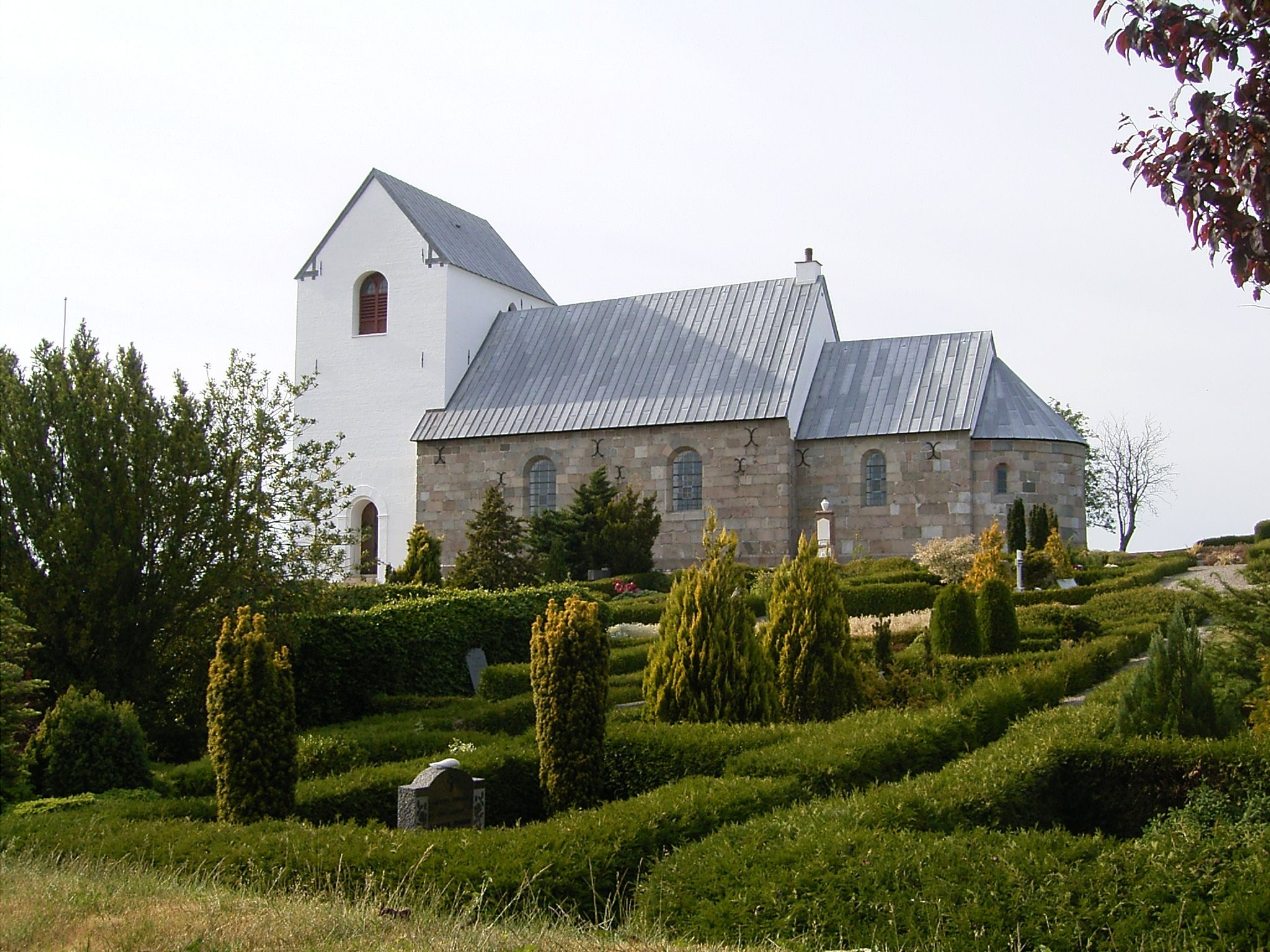 Gudum Kirke, Louisendalvej 14, Gudum 9280 Storvorde, Aalborg Kommune, Denmark